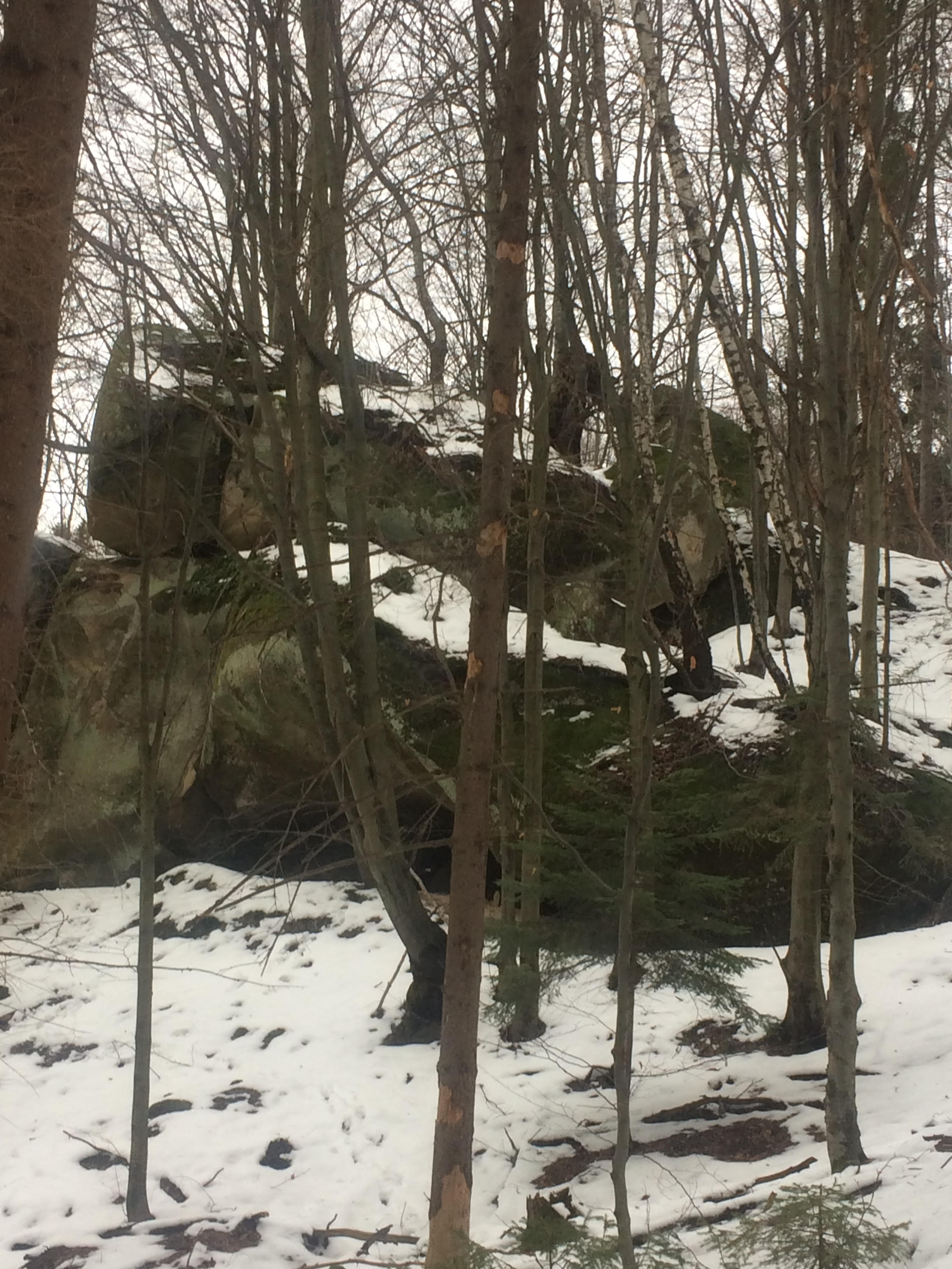 Радіостанція "Самостійна Україна", криївка "Афродита". Місце де розташовувалась власне радіостанція у 1944 році. Стан на січень 2020 року. Фото Андрй Мочурад.